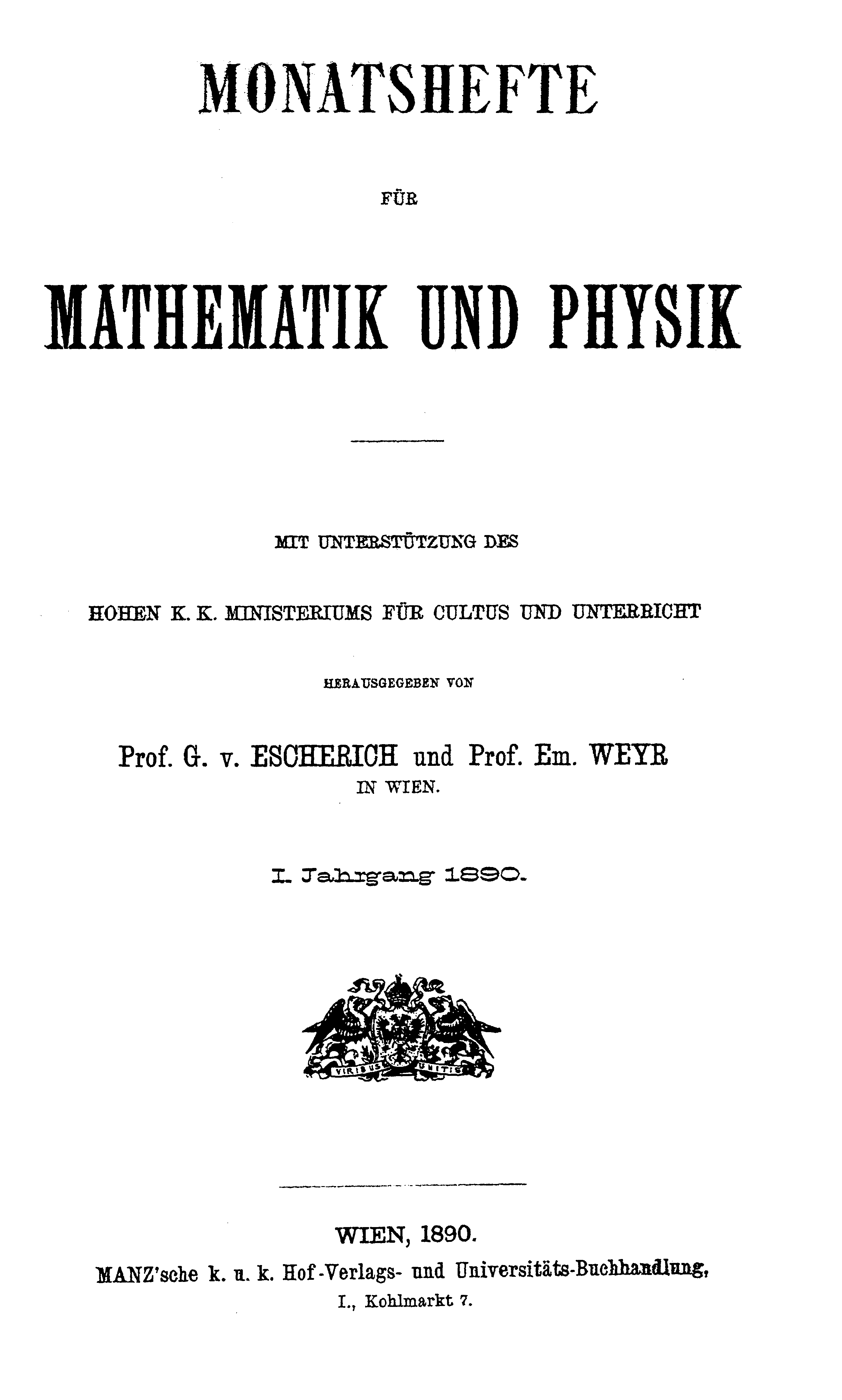 Titelseite der Zeitschrift / Title page of the periodical